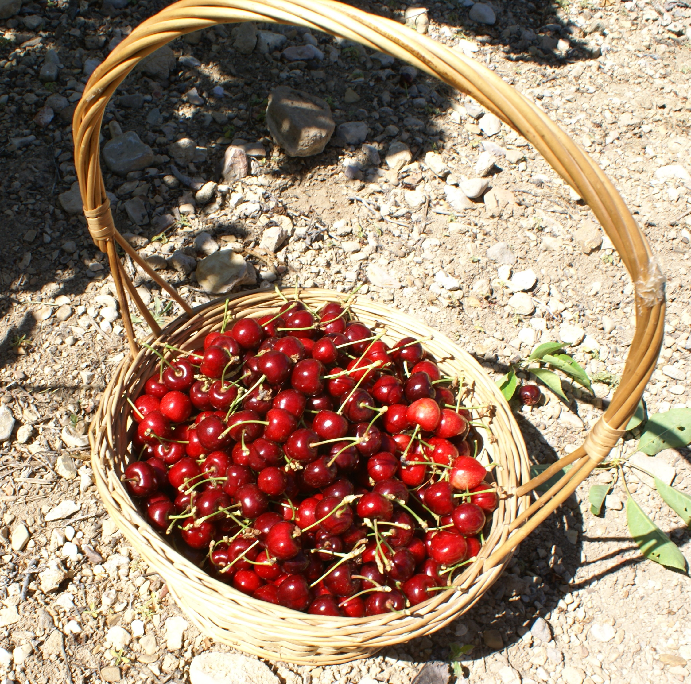 Cesta de cerezas, Alcalá la Real , Jaen , España